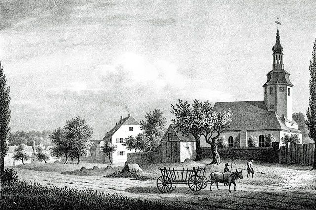 Dorfkirche von Plaußig, um 1850